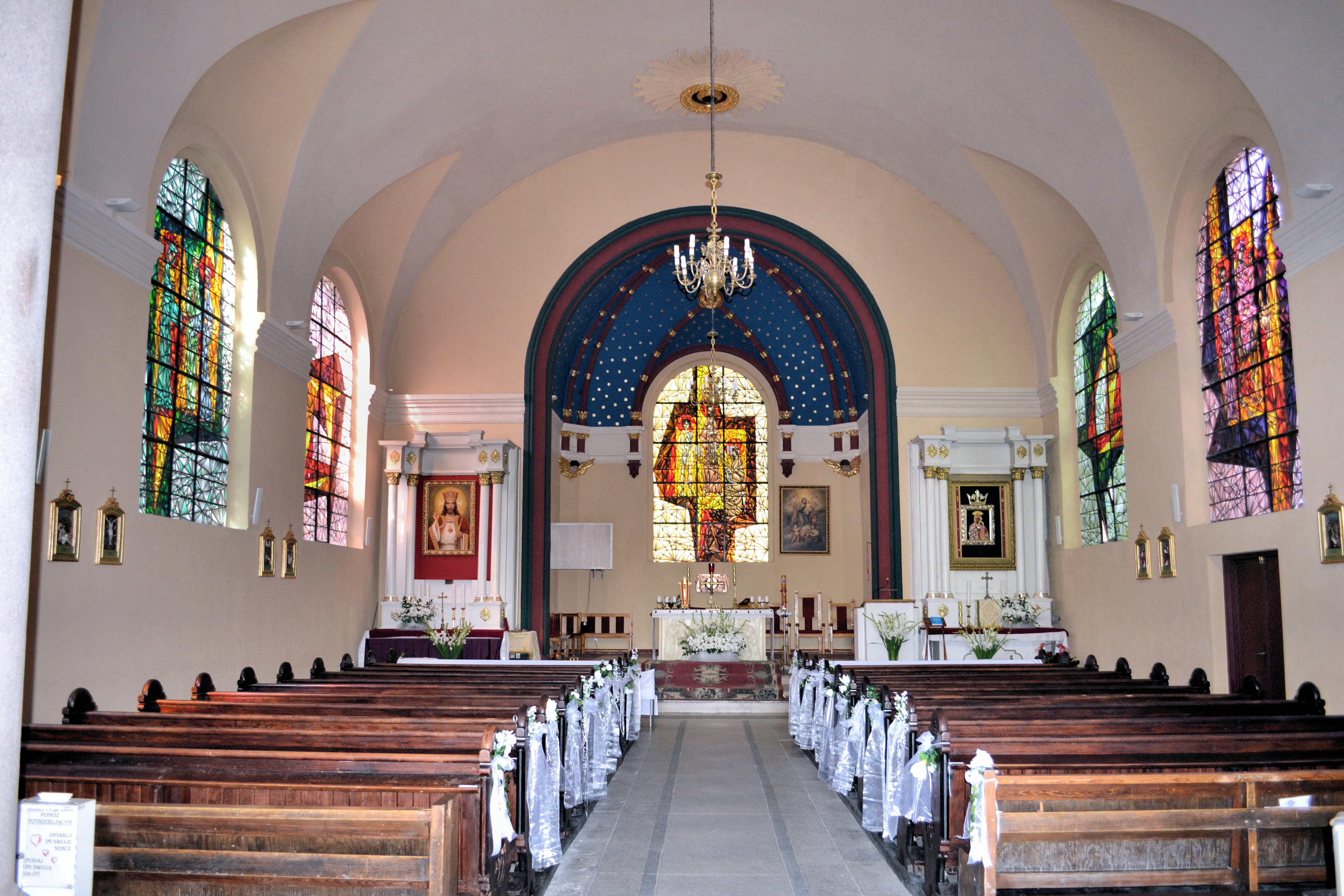 Kościół św. Józefa w Szczecinie (os. Pomorzany)